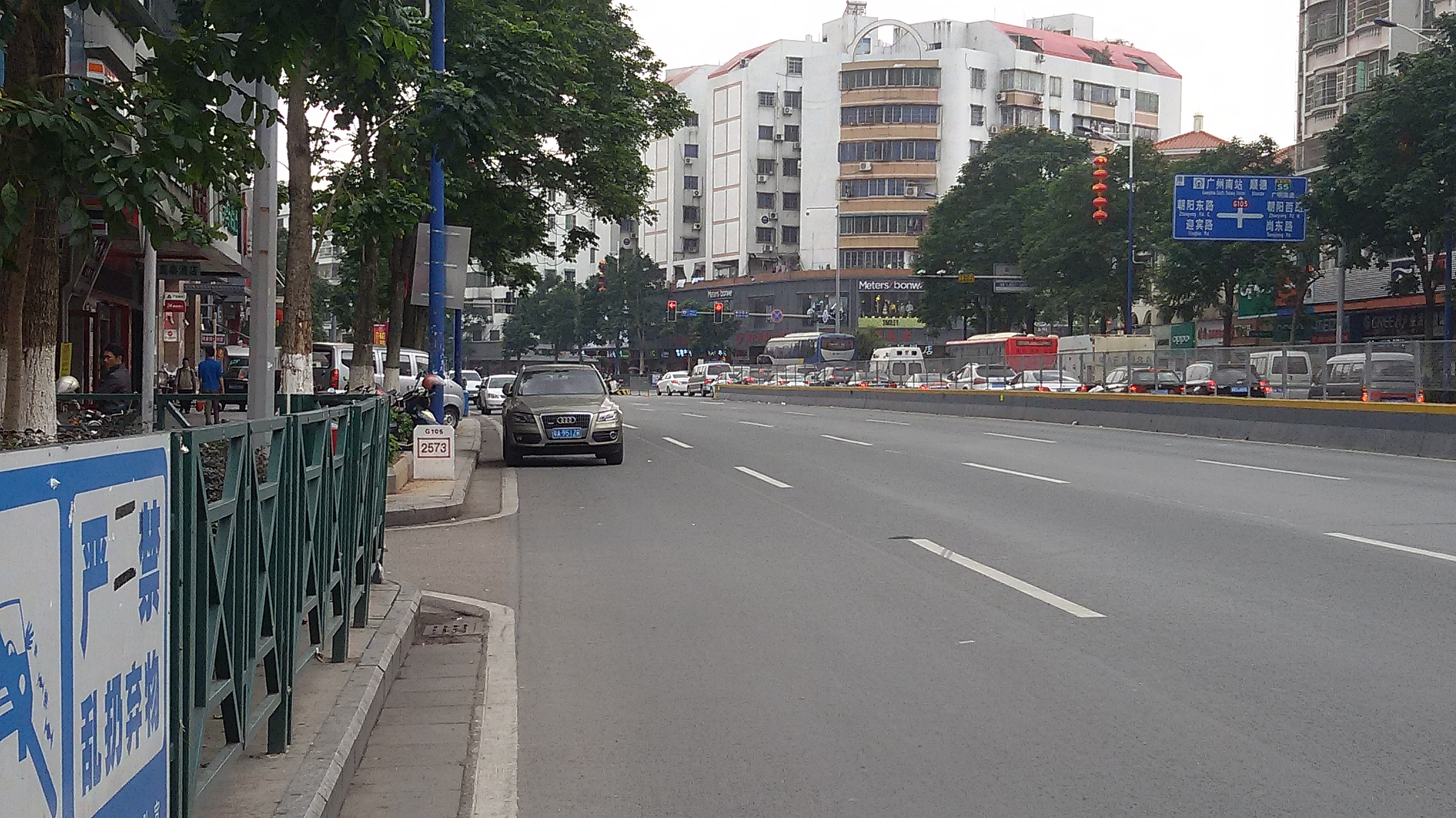 粵語: 105国道嘅番禺大石路段（公里牌标记：2573）